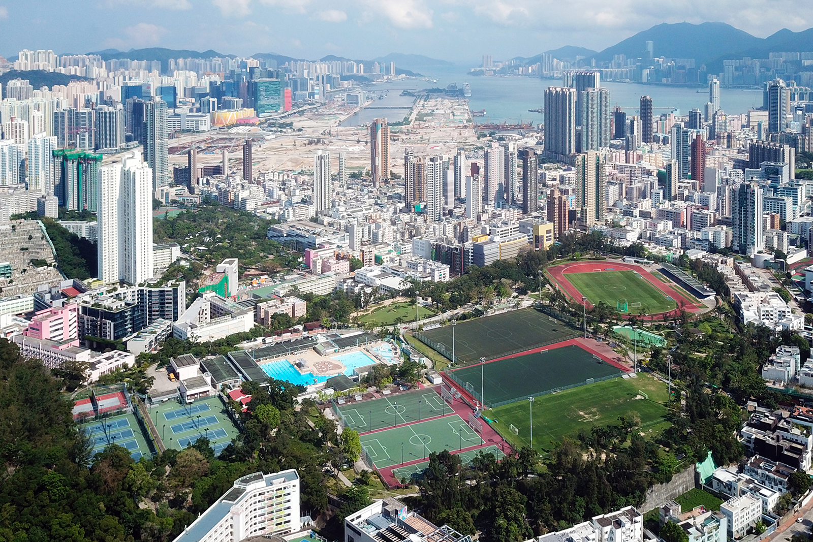 Kowloon Tsai Park